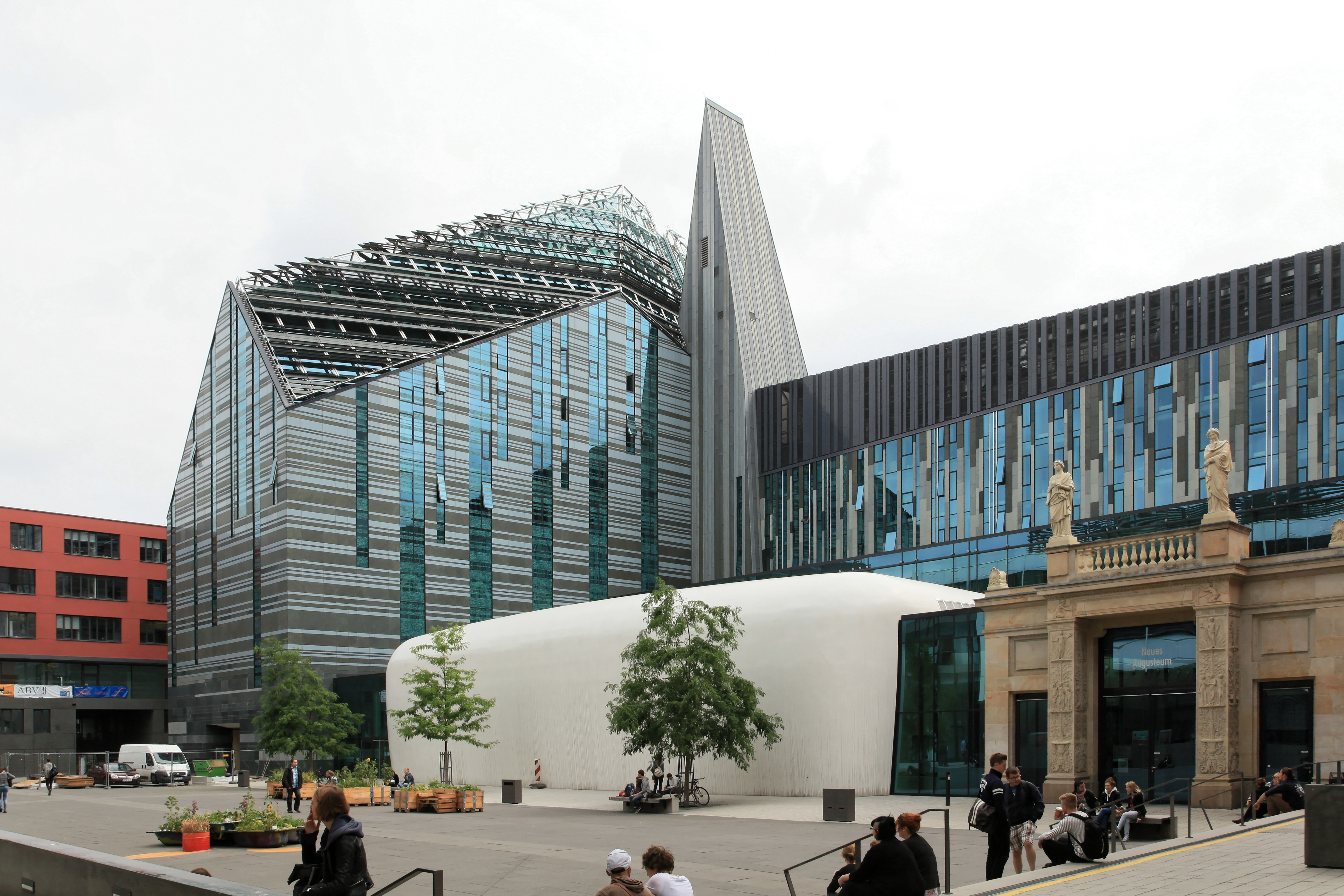 Uni-Gebäude mit Paulinum, Neues Augusteum und Schinkeltor, Universitätsstraße in Leipzig